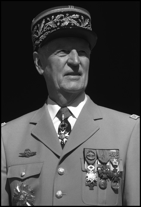 Portrait